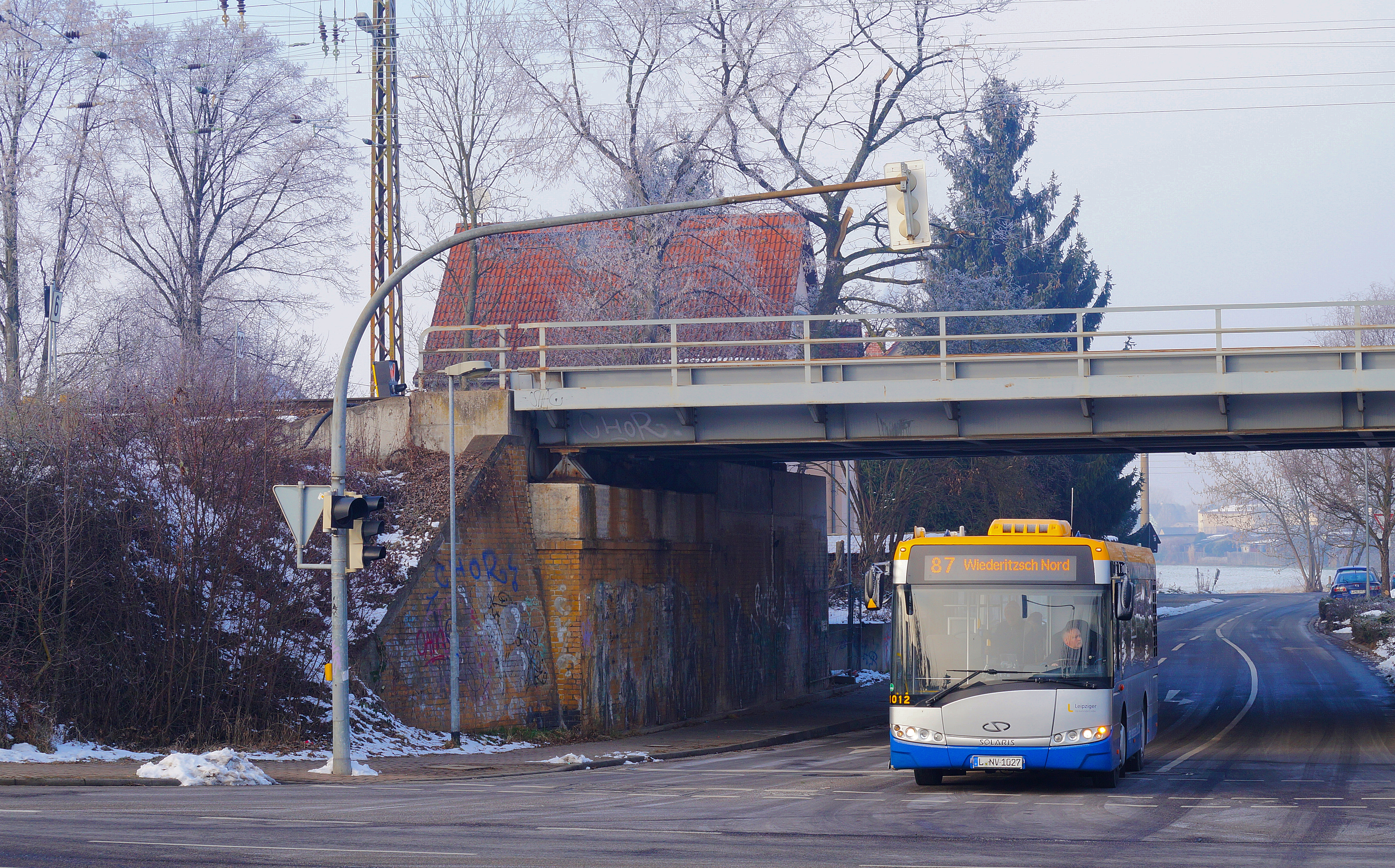 11012 in Wiederitzsch